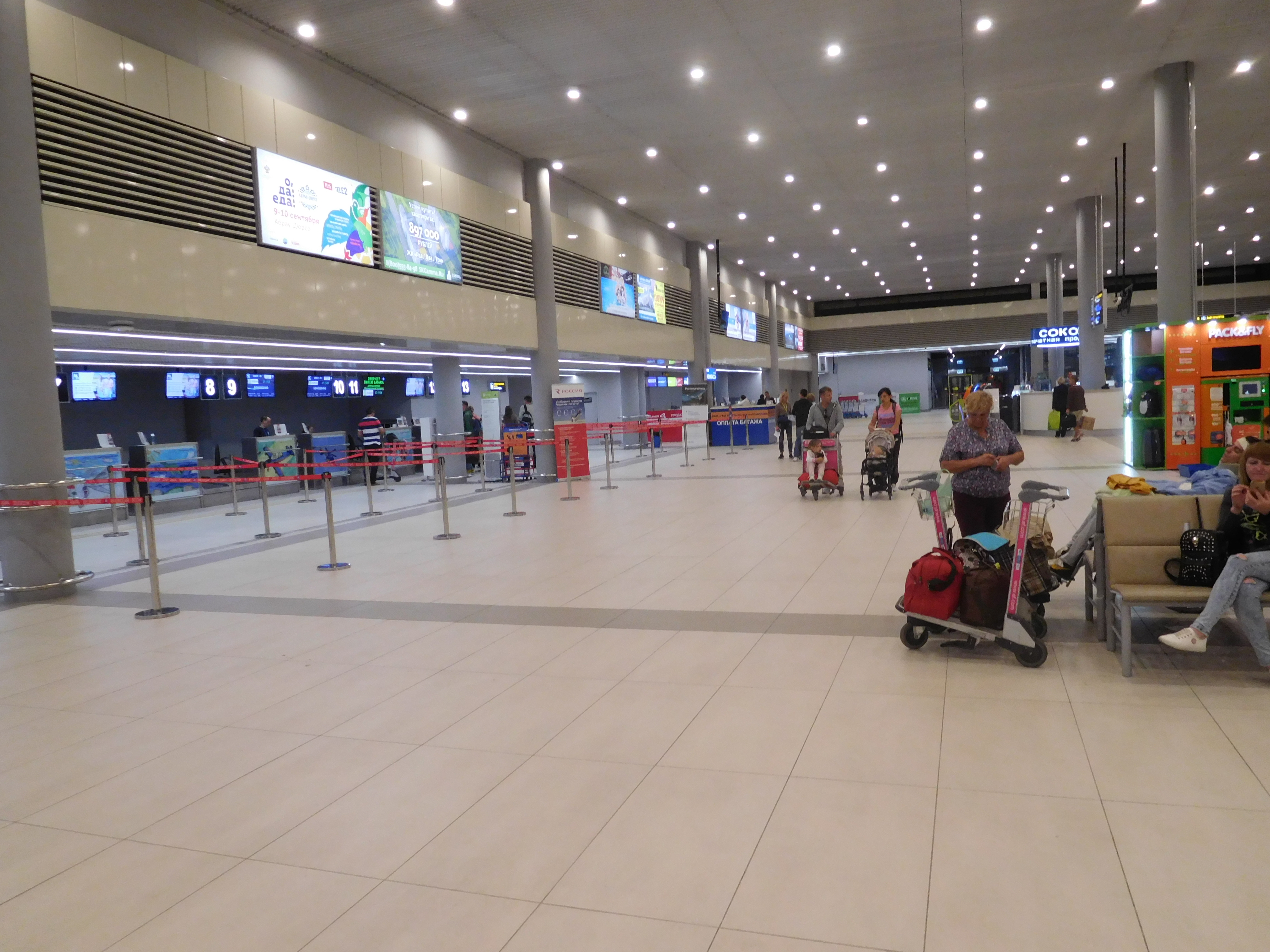 Аэропорт Витязево